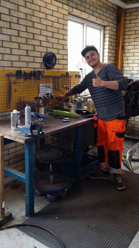 Maskinverkstad Kvinnerstaskolan